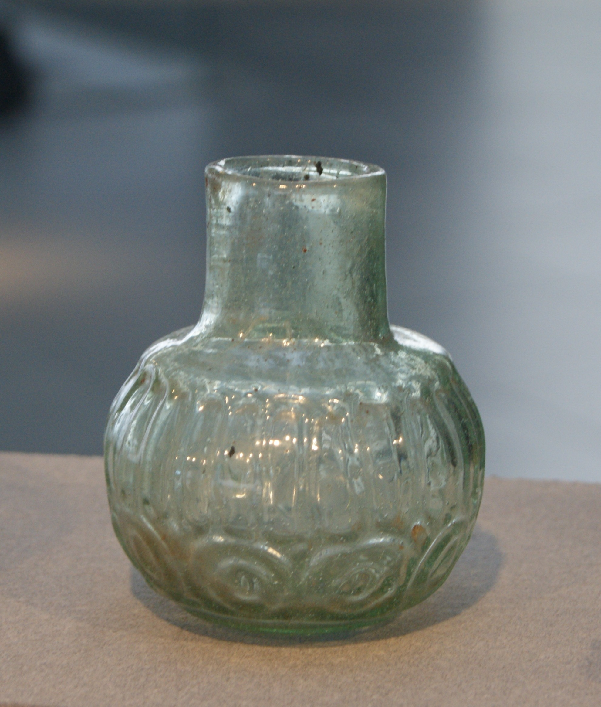 Flacon à cotes Égypte - 7ème - 9ème siècle Verre soufflé moulé Espace A, vitrine 5B - Inventaire OA 7897